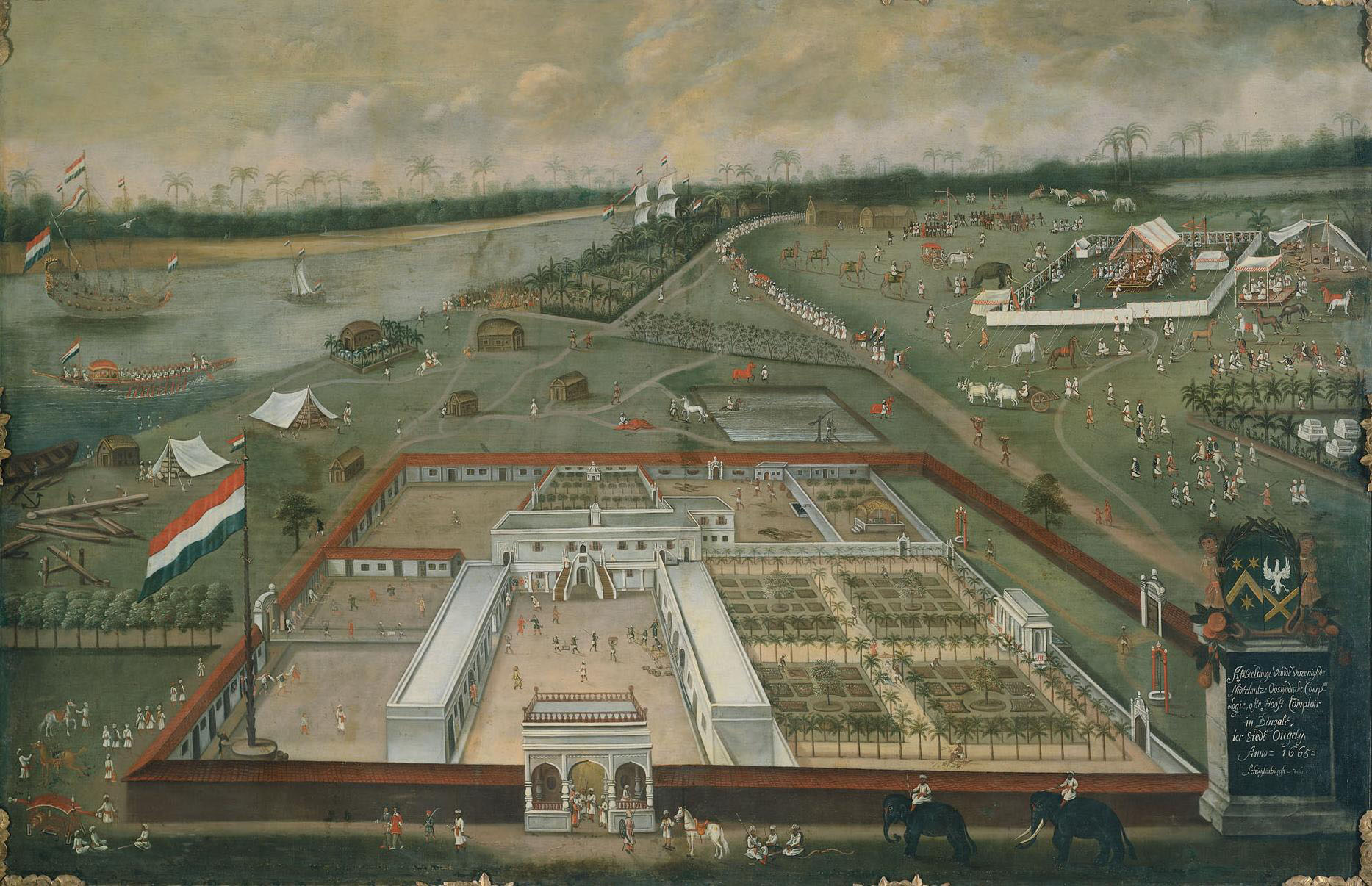 Pendant of File:Hendrik van Schuylenburgh 002.jpg